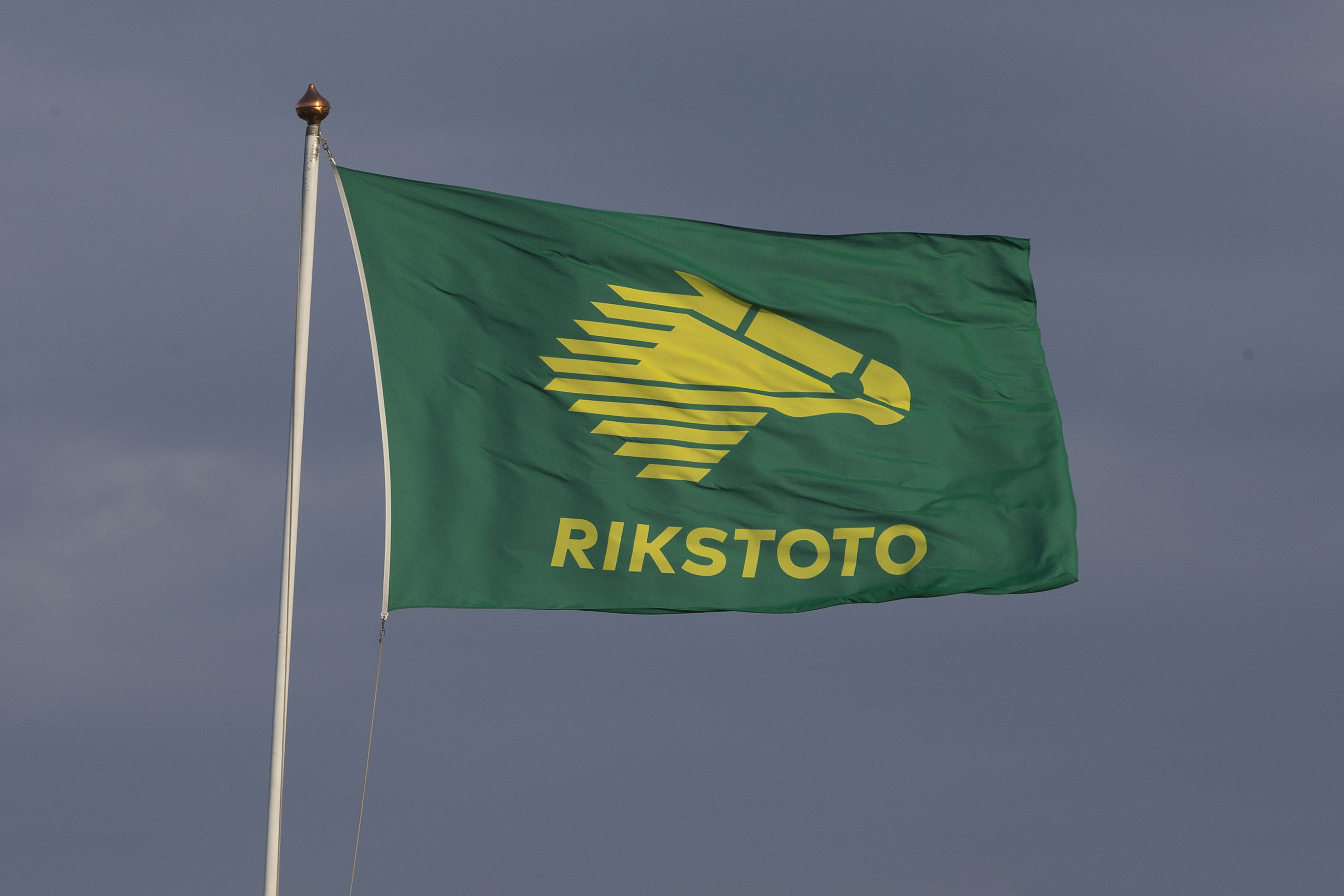 Rikstoto-flagg